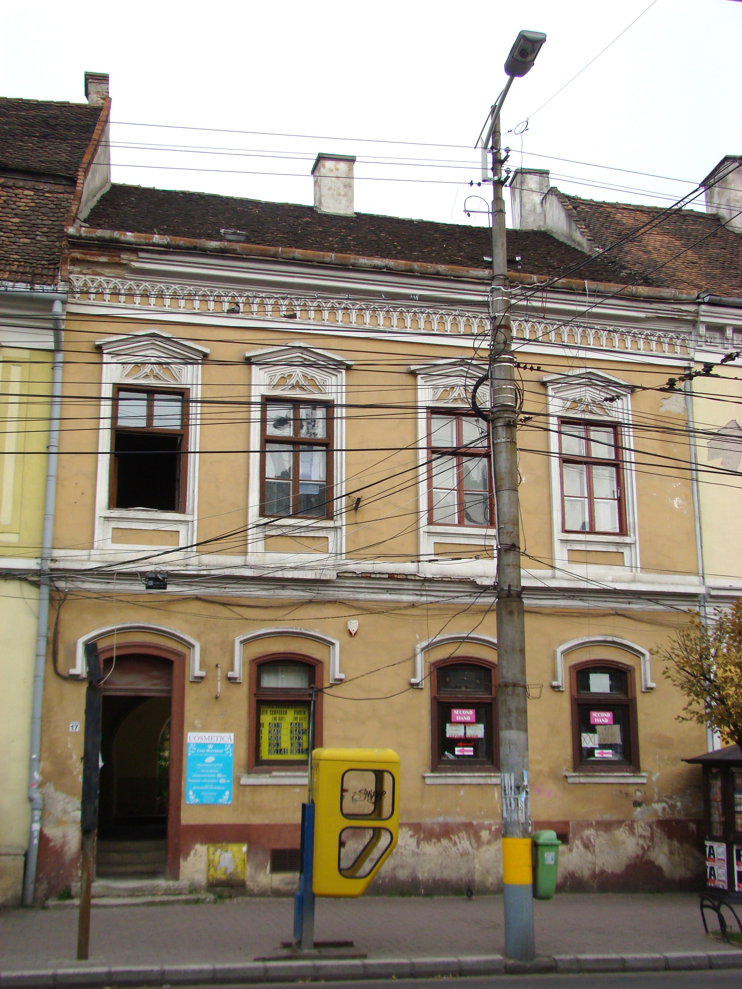 Clădire monument istoric, str. Memorandumului, nr. 17